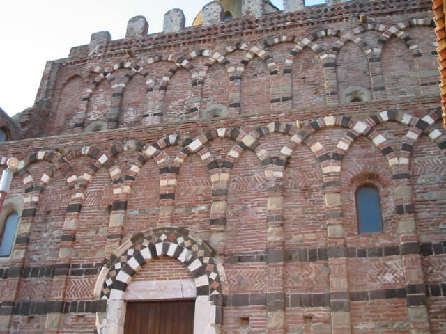 Chiesa dei SS Pietro e Paolo di CAsalvecchio Siculo